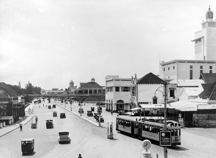 Repronegatief. De Pasar Besar met op de achtergrond het spoorwegviaduct, de zogenoemde Hogeweg, Soerabaja